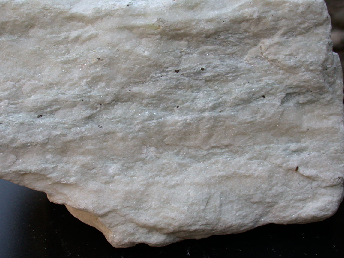 Esempio di marmo pentelico (marmo bianco utilizzato in epoca greca e romana)